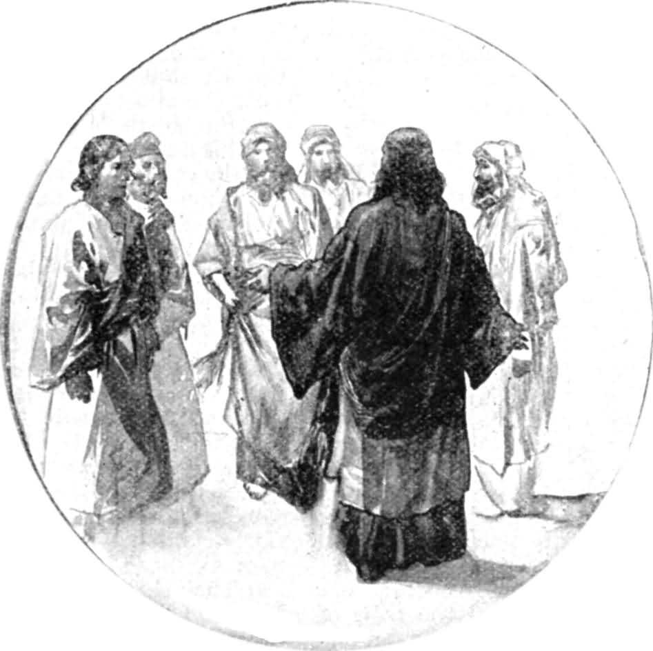 Мойсей, Аарон та його сини. Мойсей покликає Аарона і його синів на священство